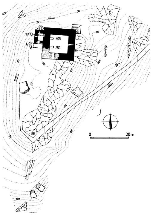 Burg Přimda, Westböhmen, Tschechische Republik. Gesamtplan der Burg, Zustand der Burg im Jahr 2007. Veröffentlicht von Vladislav Razím in: Průzkumy památek 2008, S. 40 Abb. 4 auf der Grundlage einer Kartierung von Tomáš Durdík: Hrad Přimda. Praha 2007.